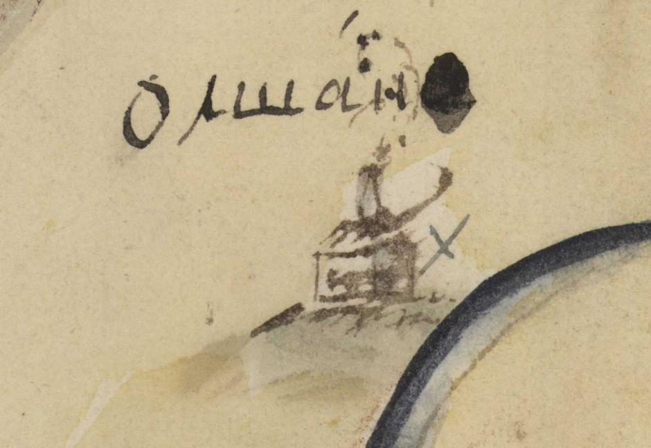 Фрагмент карти Київської губернії. XVIII століття. РГАДА, ф. 192, оп. 1, Киевская губ., № 5.